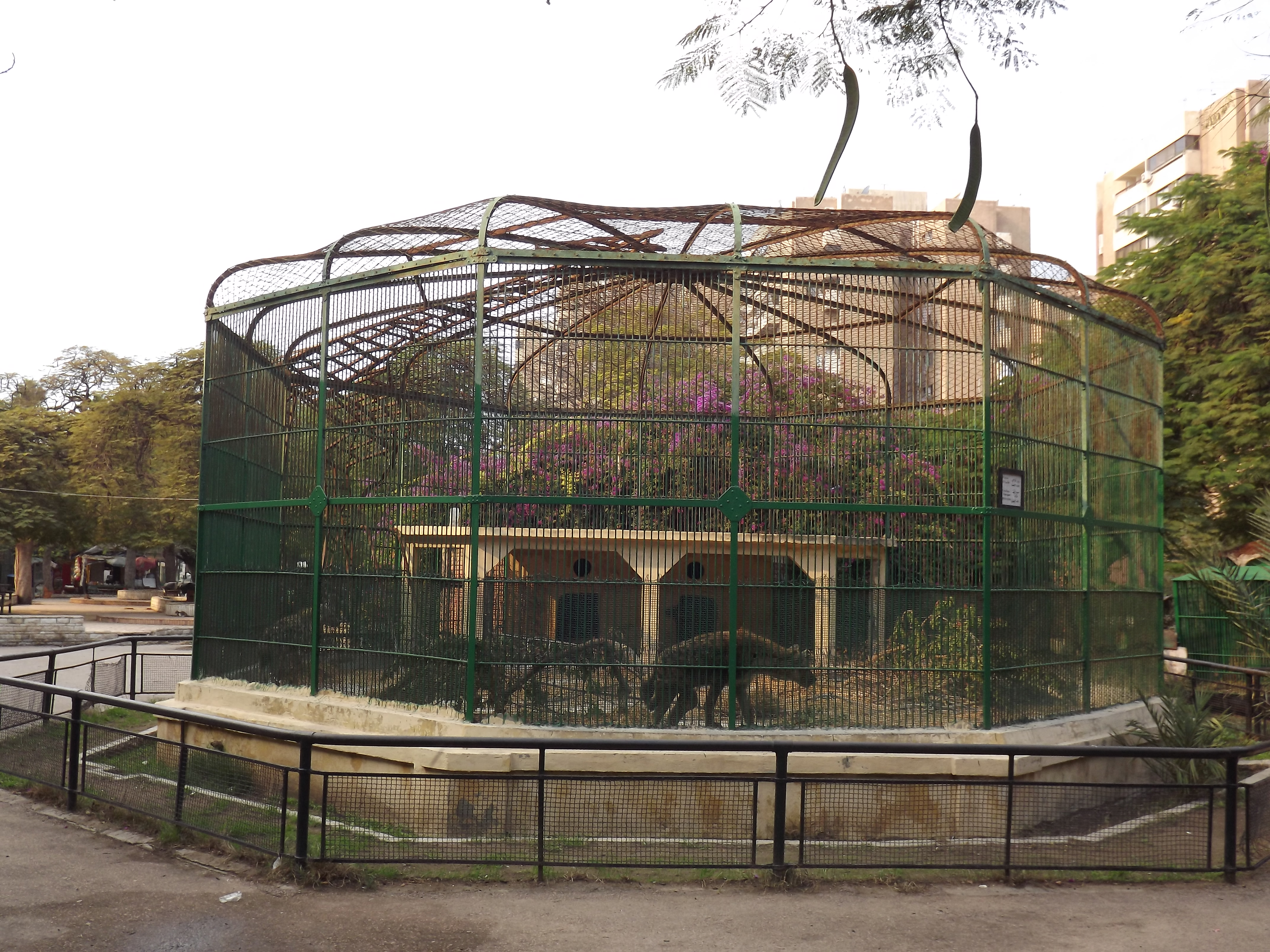 ضبع منقط في حديقة حيوان النزهة - الاسكندرية